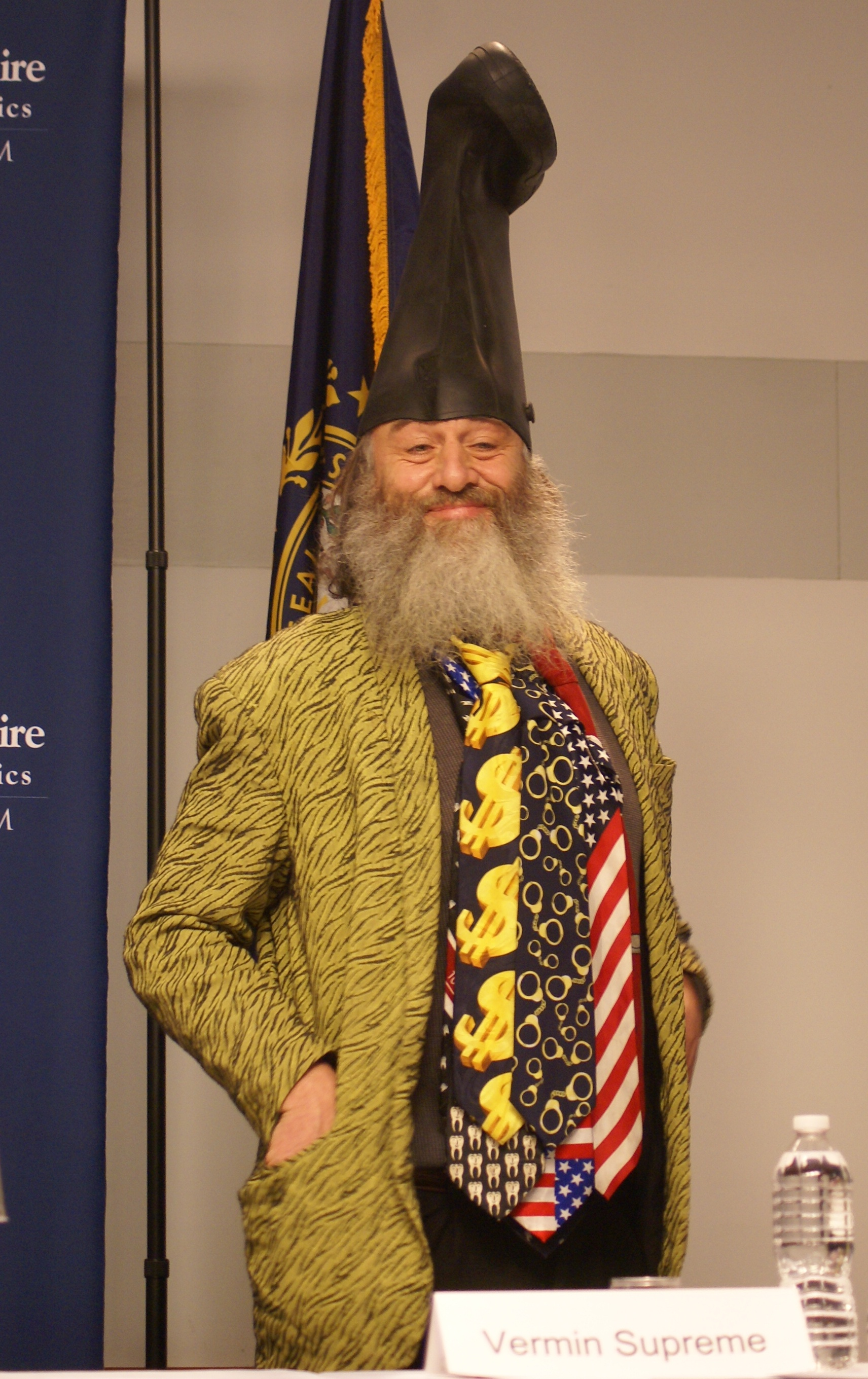 Vermin Supreme